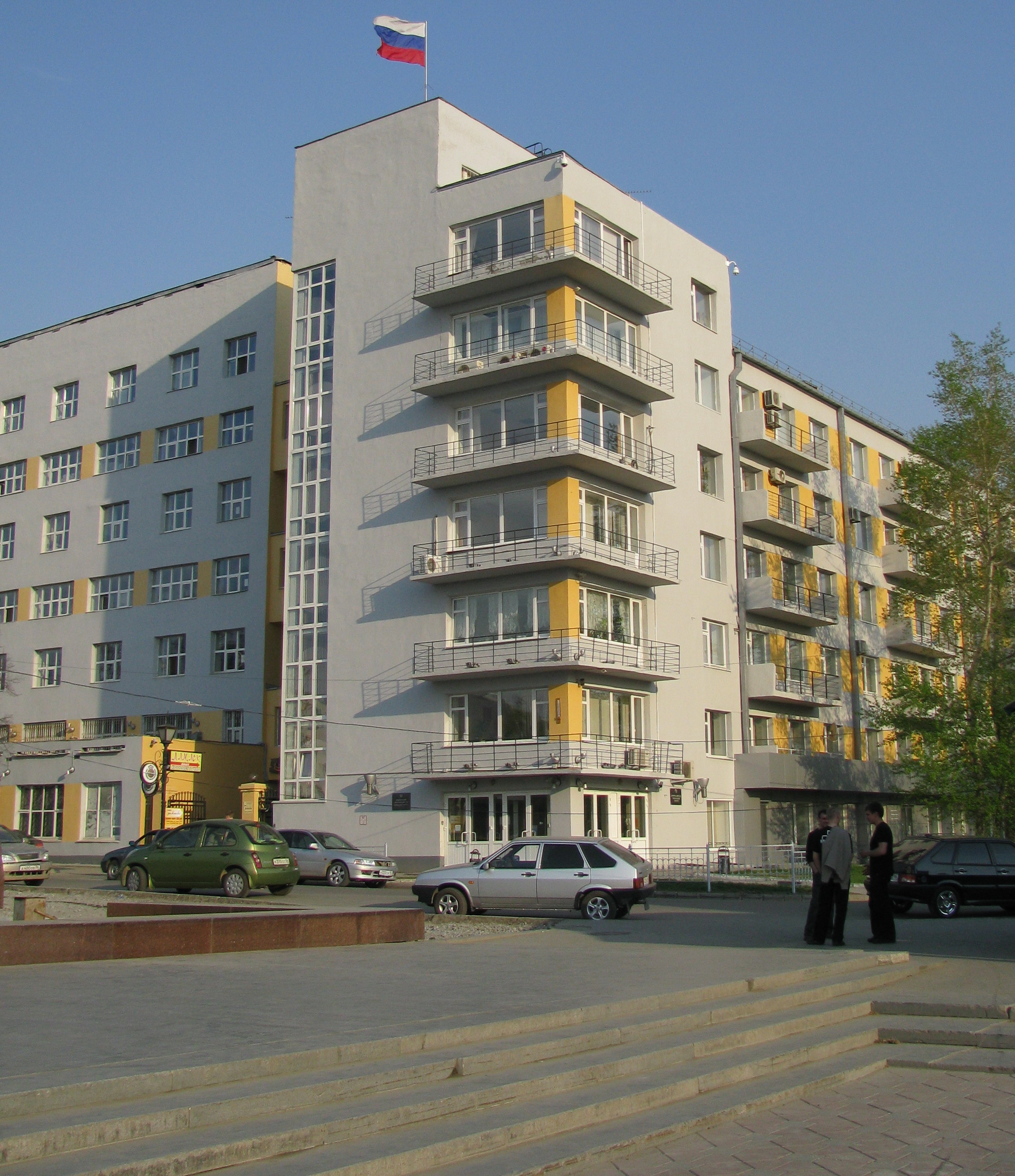 Федеральный суд Уральского округа